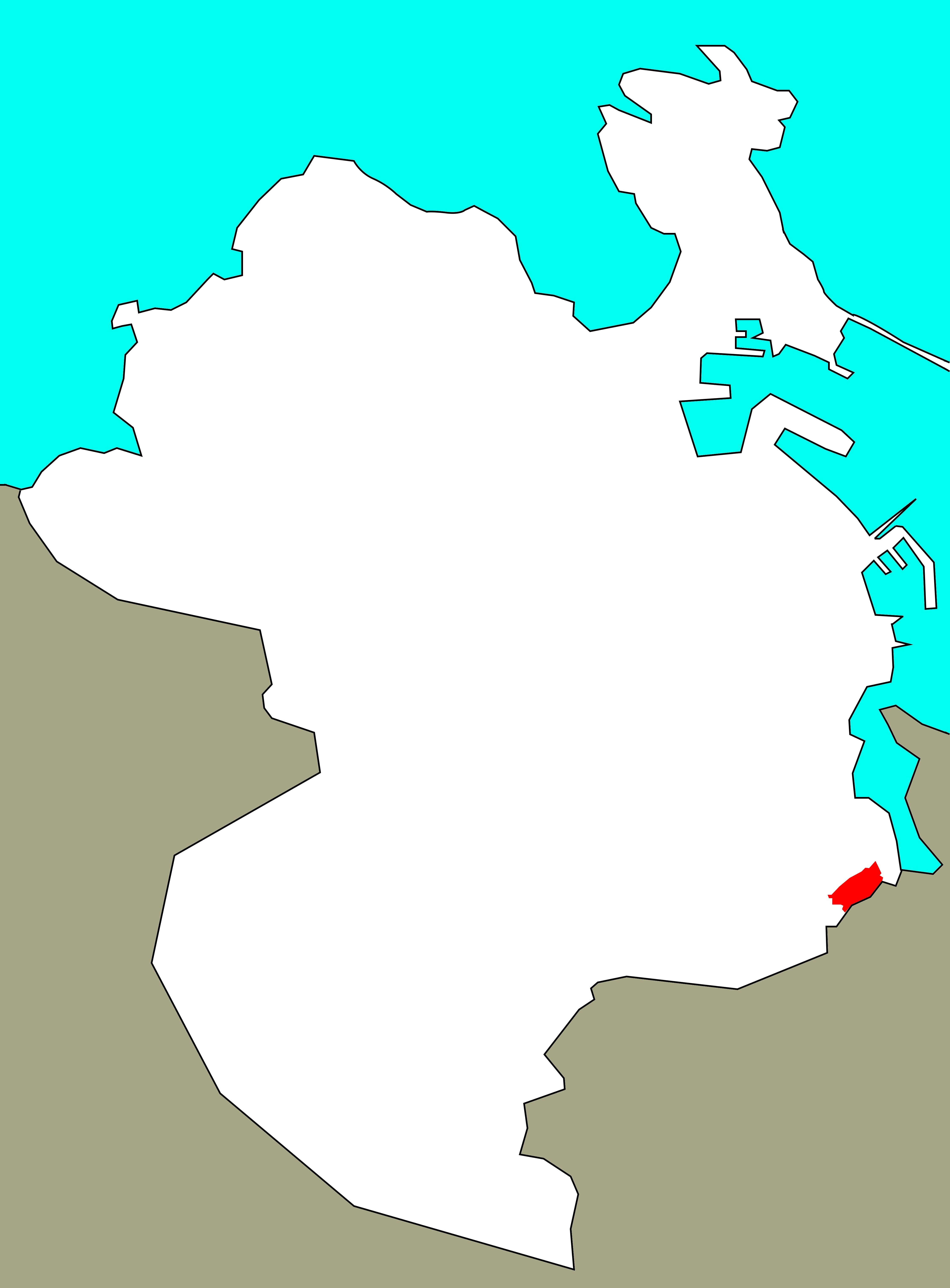 Situación de Río de Quintas no concello da Coruña, segundo